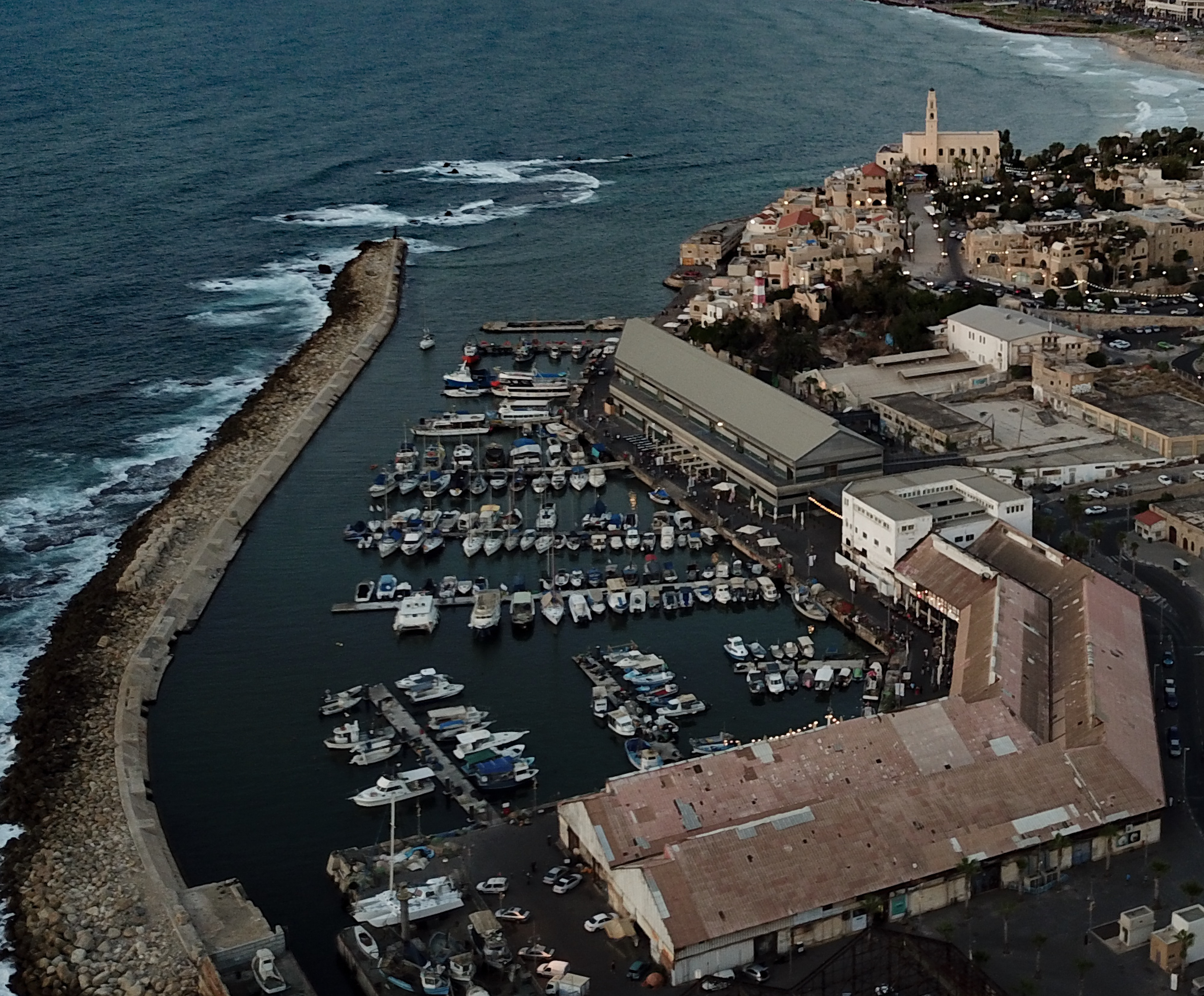 4 האנגרים שבנו הבריטים בשנות ה-30 ושימשו לאחסון תוצרת ליבוא ויצוא. האנגר 1 שופץ בשנים האחרונות.